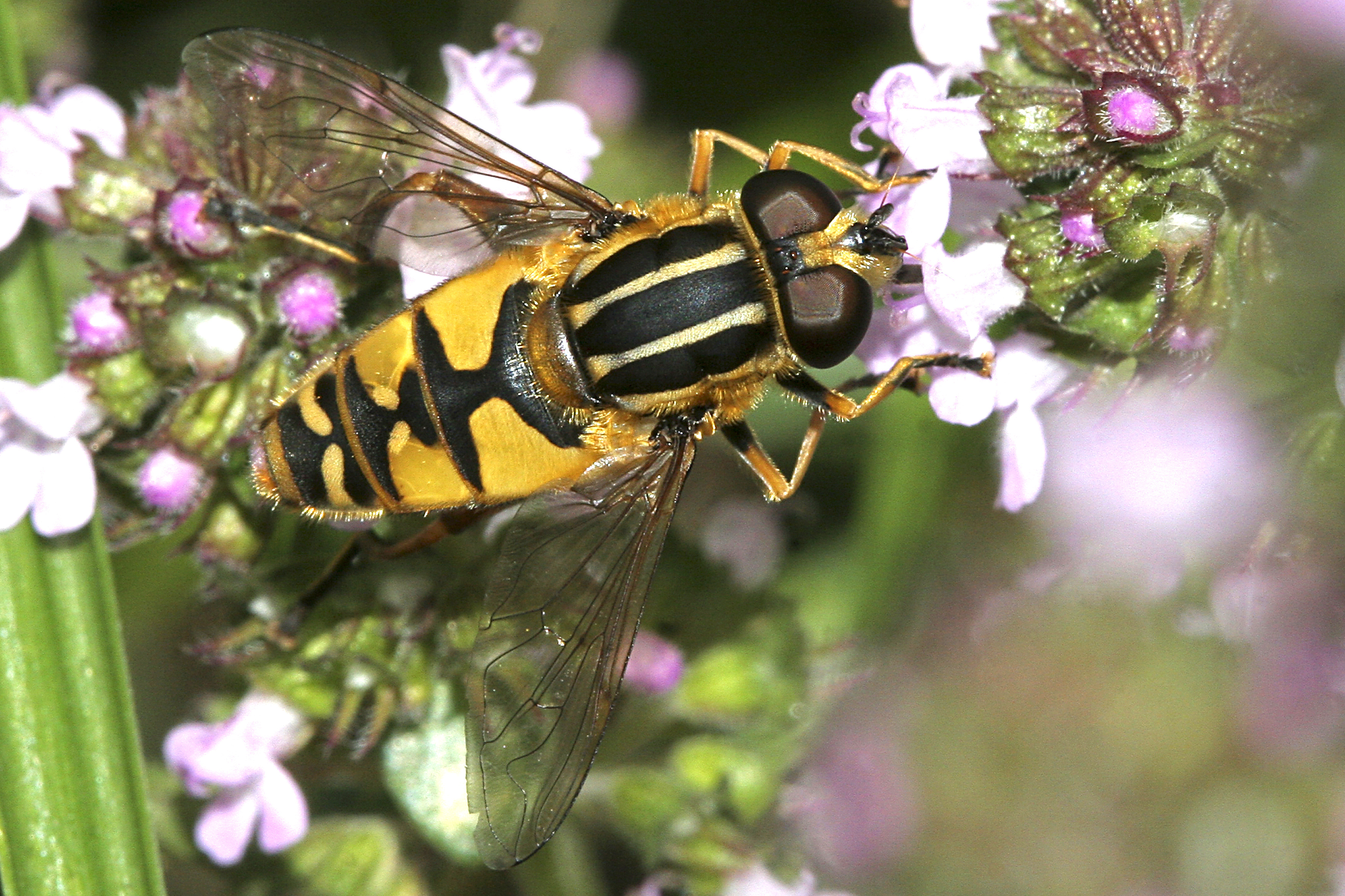 Helophilus pendulus.